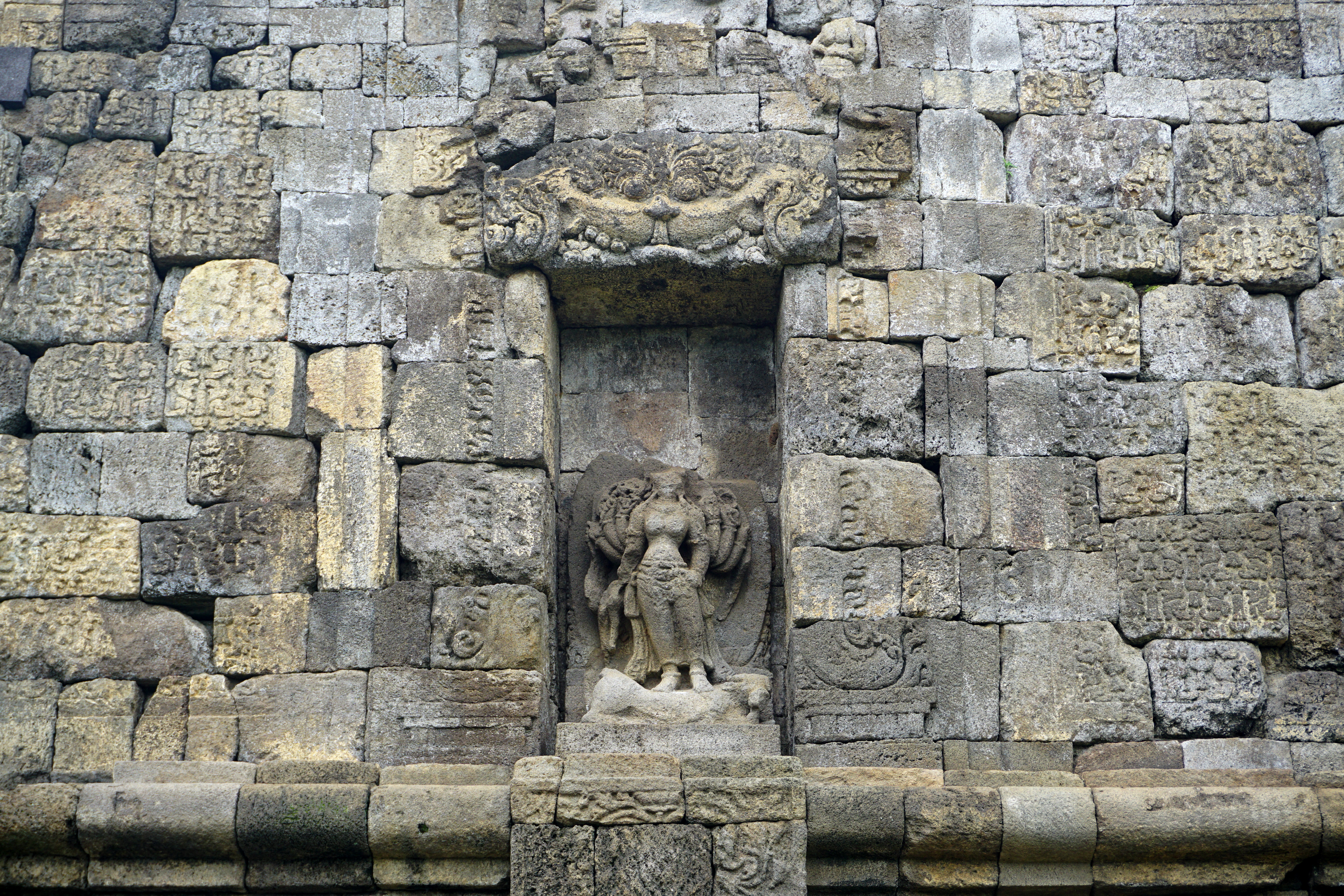 040 Durga Mahisasuramardini, Candi Badut, Malang Candis, East Java Malang, East Java